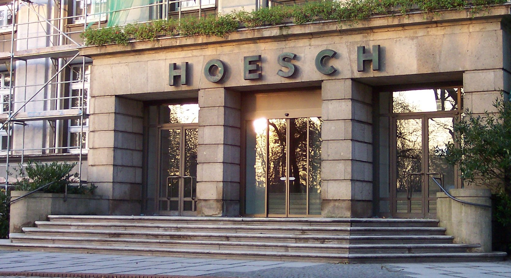 ehemalige Hoesch-Hauptverwaltung, Rheinische Straße, Dortmund, Eingang, Versorgungsamt